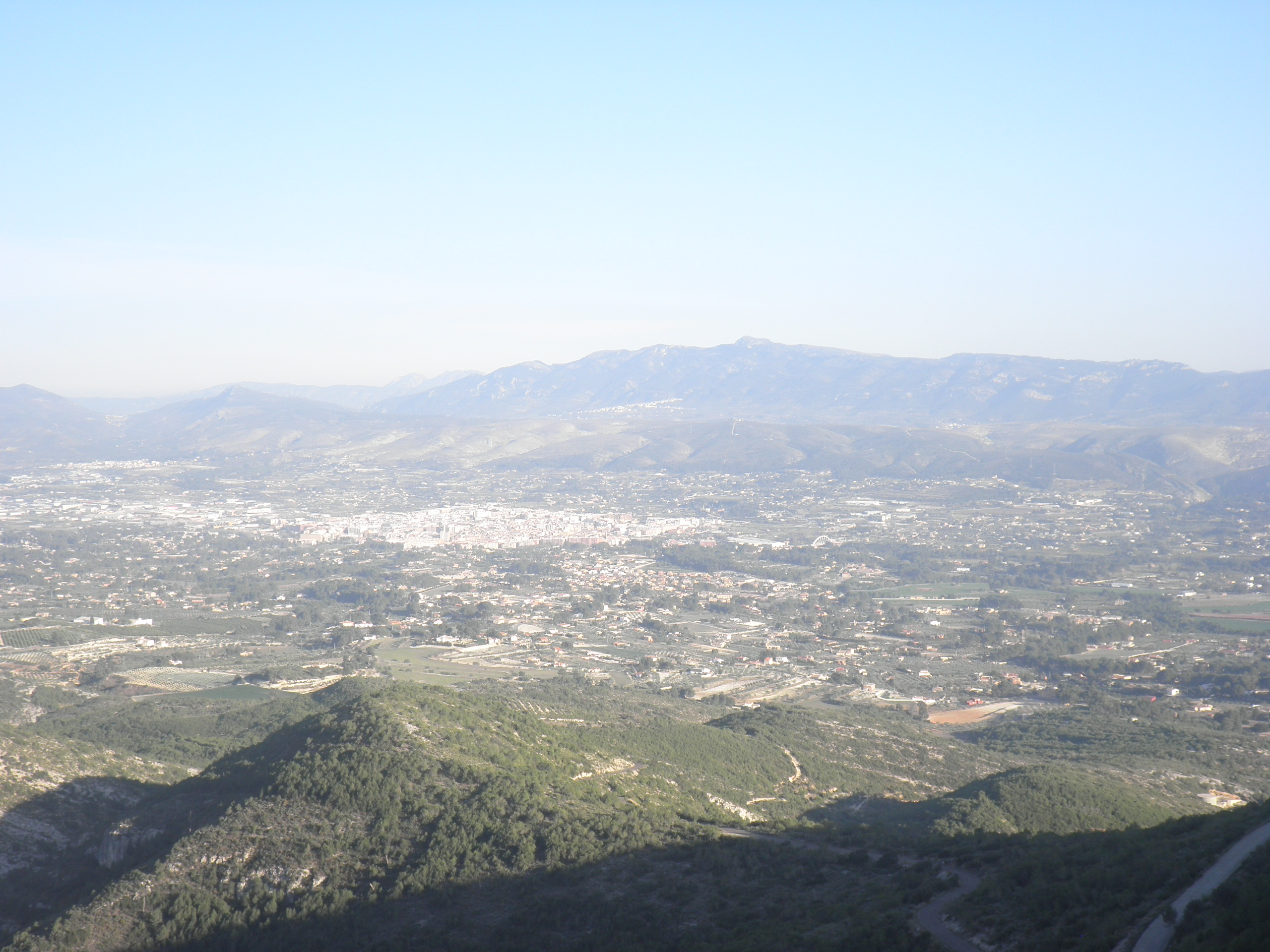 Vista desde la serra de Sant Esteve desde on es veu el poble d'Ontinyent